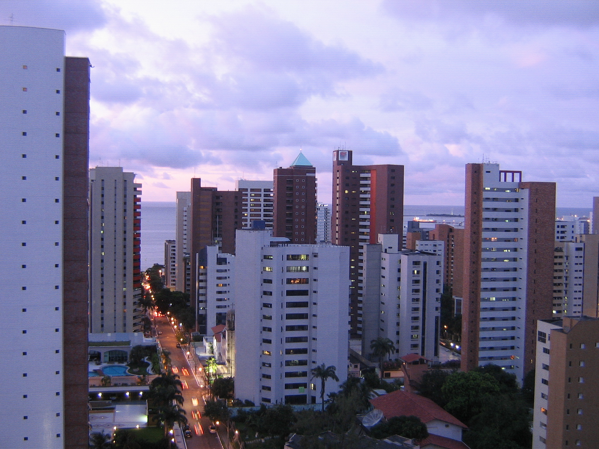 Vista do Bairro Meireles em Fortaleza